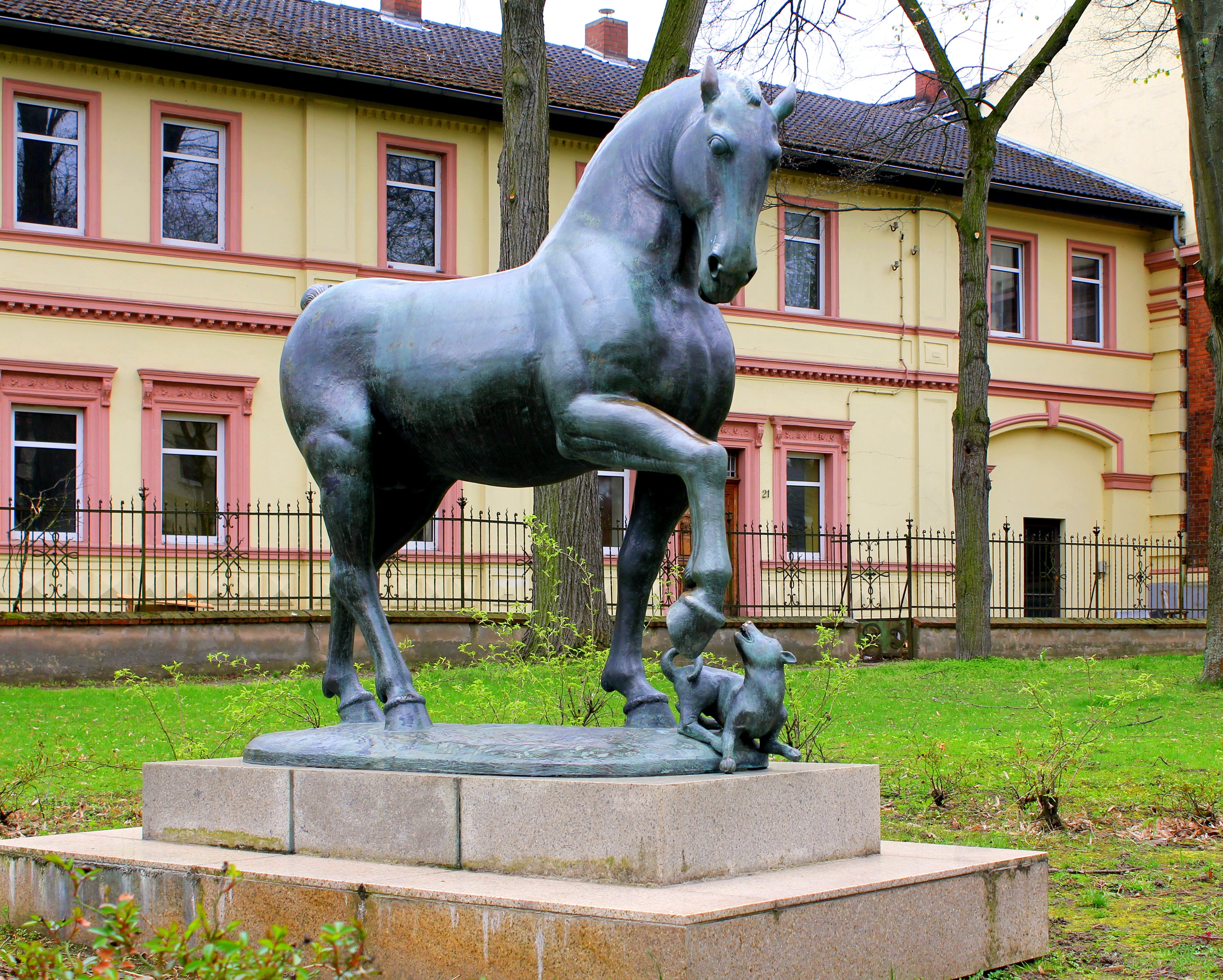 Denkmal Breite Straße in Altenweddingen